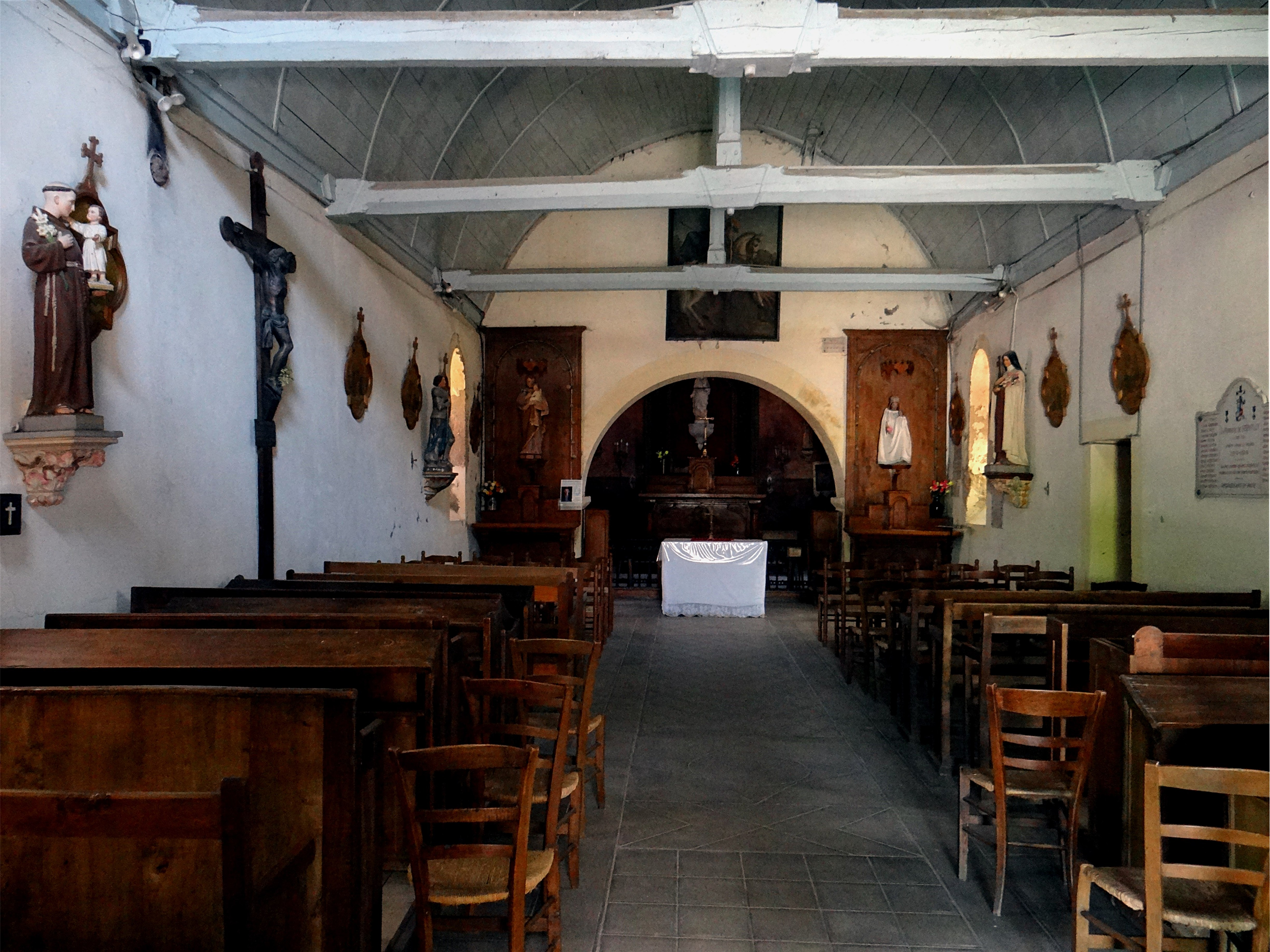 Nef de l'église Saint Jean, Servilly, Allier, France.